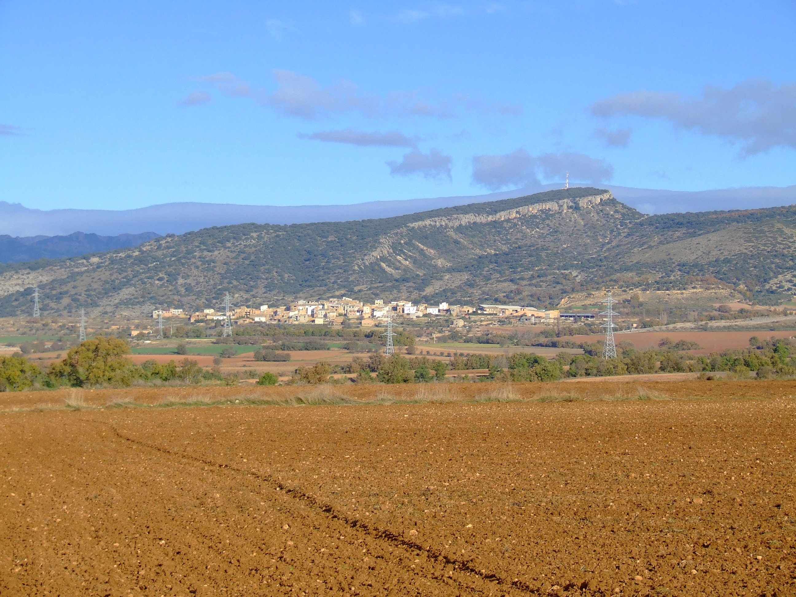 Vista general de Suterranya (Tremp, Pallars Jussà)